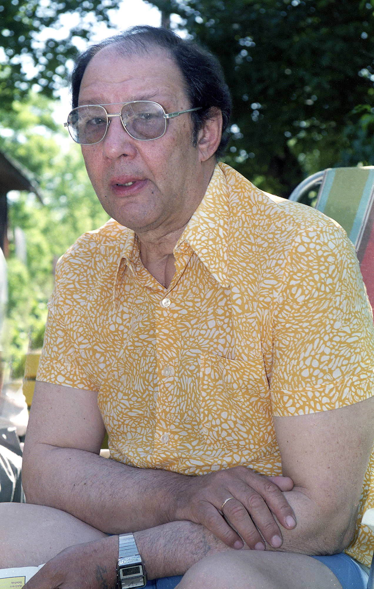 Eino Baskin, näitleja ja lavastaja 94